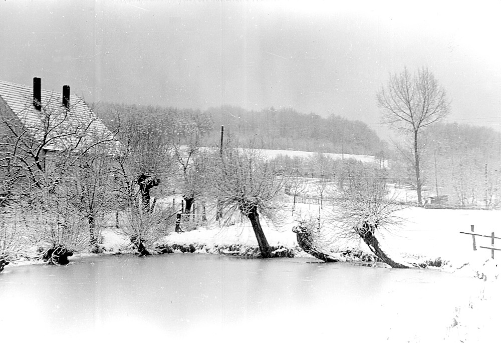 Preußisch Oldendorf, Dieckfluss: Kopfweiden am Mühlteich der früheren Ölmühle (Mittlere Mühle) mit Blickrichtung Brümmel. – Große Pappel unmittelbar am Großen Dieckfluss, markant bis in die 1960er Jahre